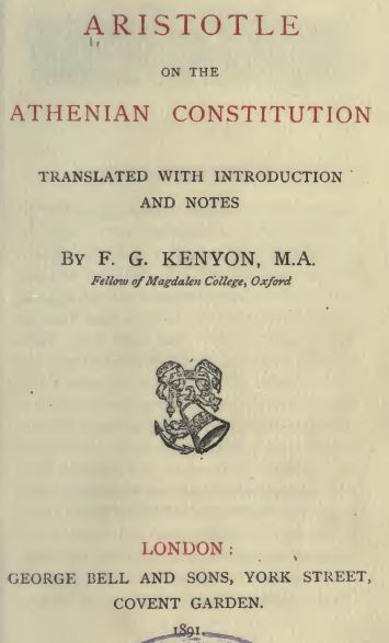 Титул книги с переводом Ф. Кениона аристотетелевской "Афинской политии". Лондон, 1891 г.